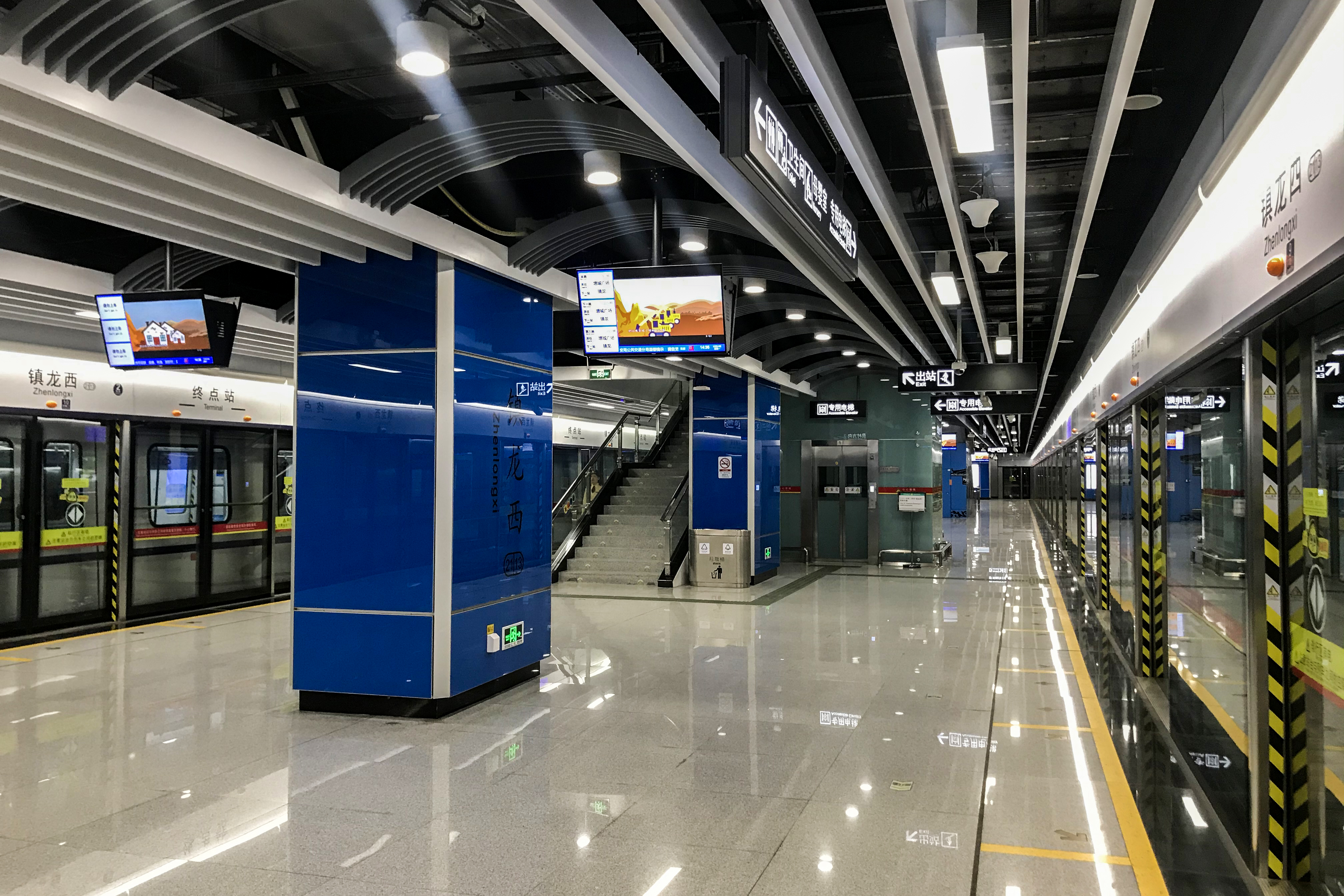 广州地铁镇龙西站